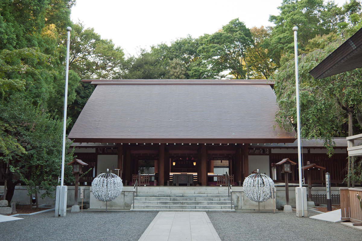 乃木神社、東京都港区赤坂8丁目。